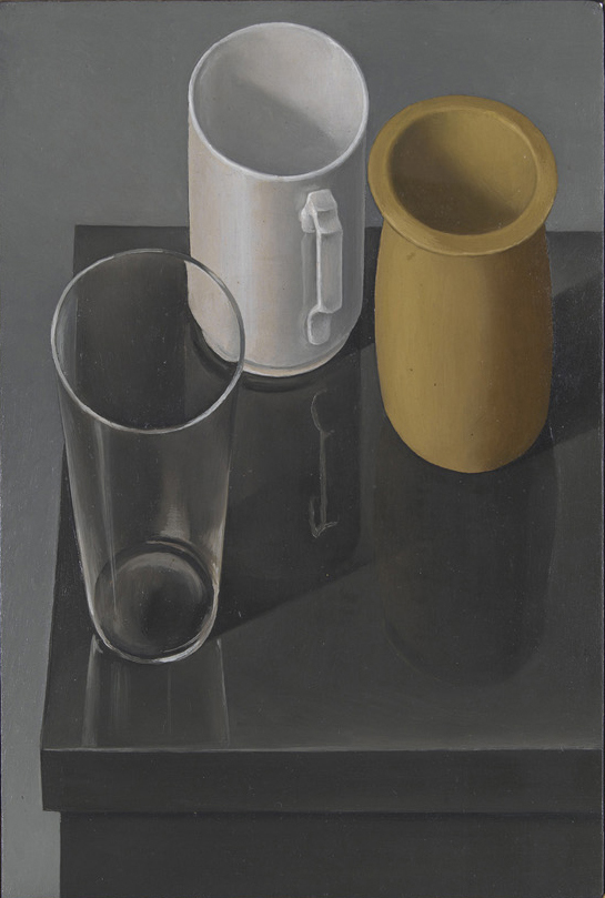 Hubert Dietrich (1930–2006): Stillleben mit weisser Tasse, Öl auf Holz, 21x14cm, 1966, Privatbesitz.